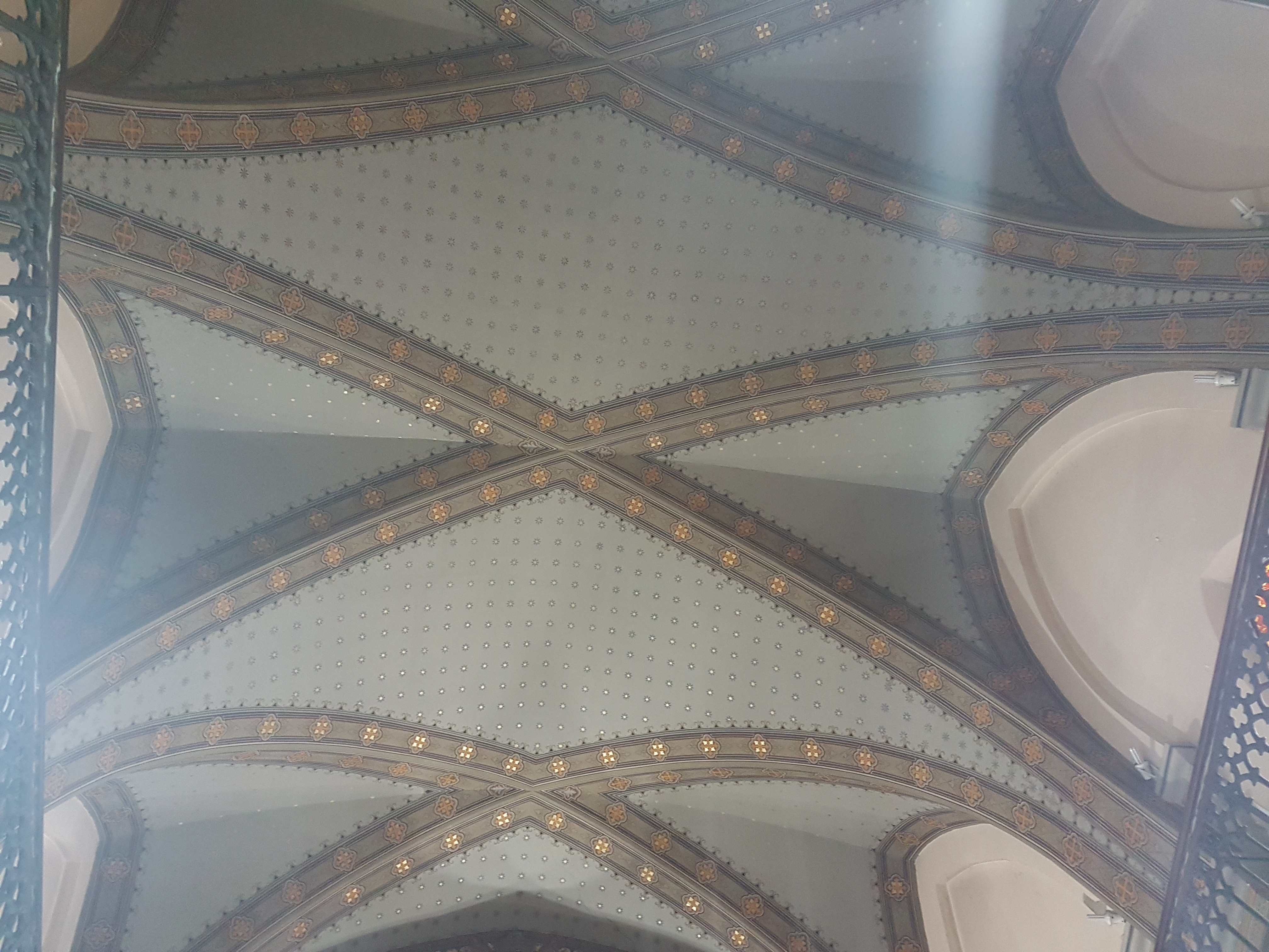 Capela do Menino Jesus e Santa Luzia, situada na Rua Tabatringuera, 104, região da Sé.